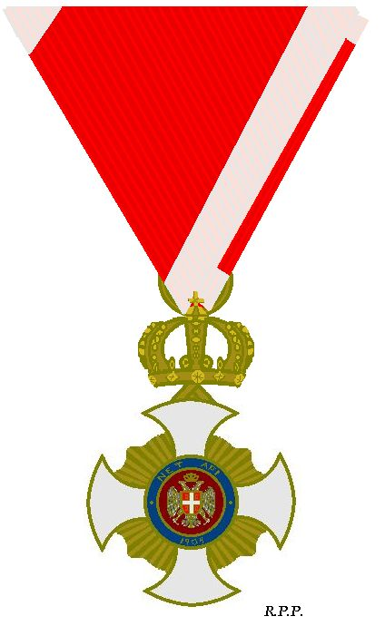 Orde van Karageorge in civiele uitvoering aan vredeslint